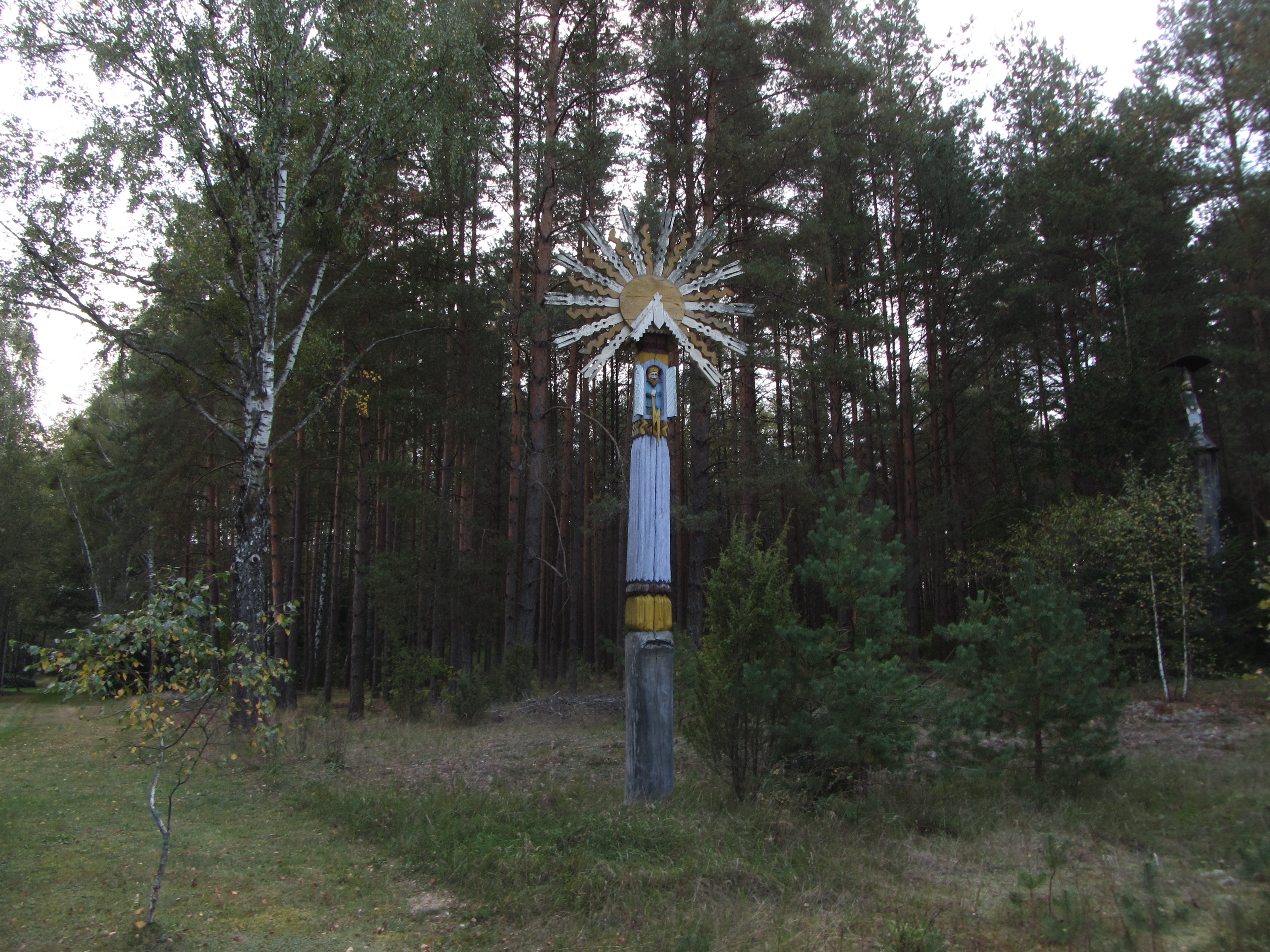 Viečiūnų sen., Lithuania